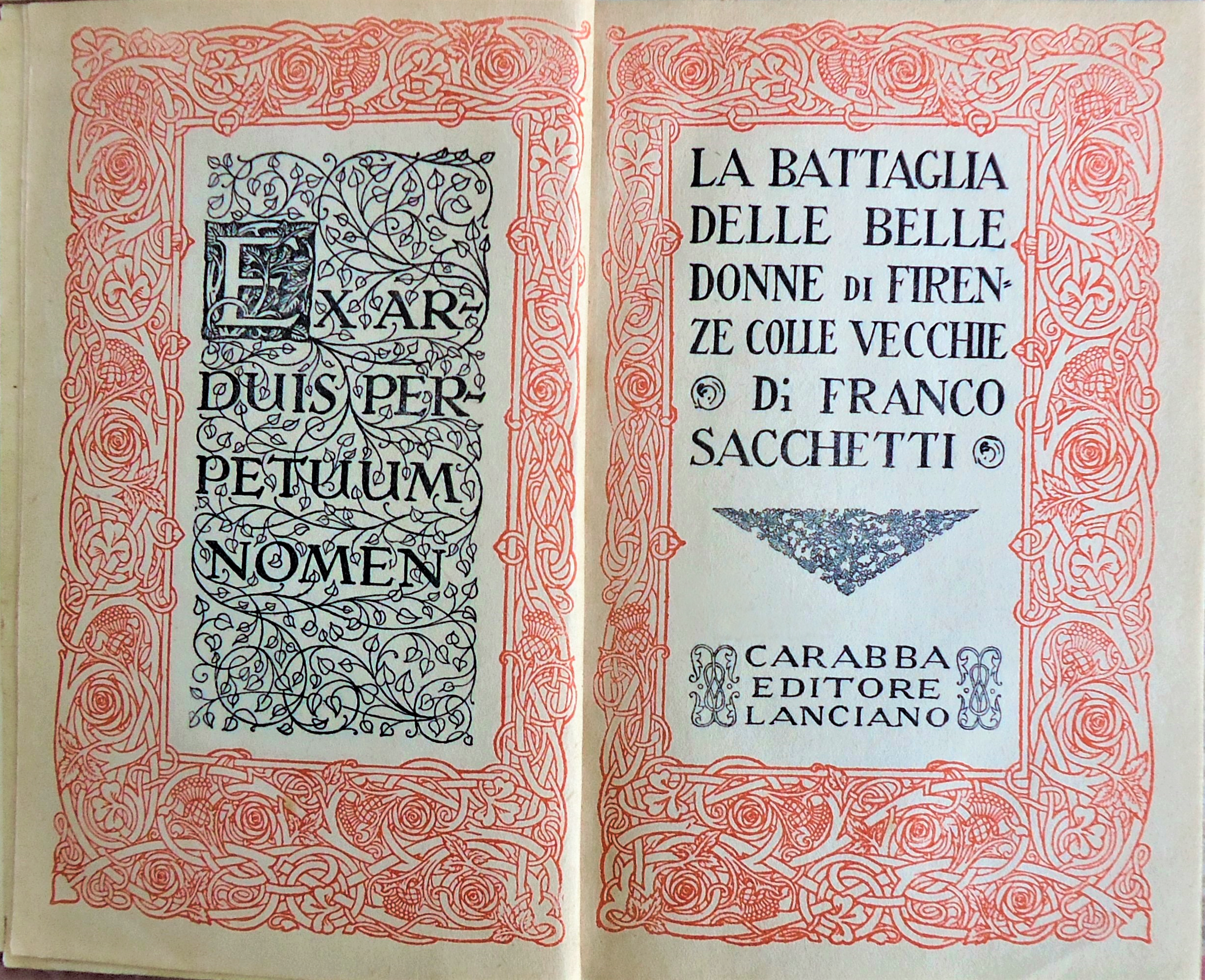 Collana Scrittori italiani e stranieri. Introduzione di Giuseppe Gigli.